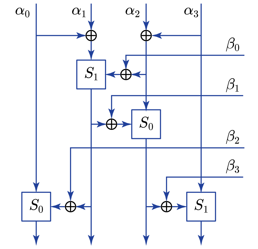 תיאור הפונקציה f בתהליך הכנת המפתח